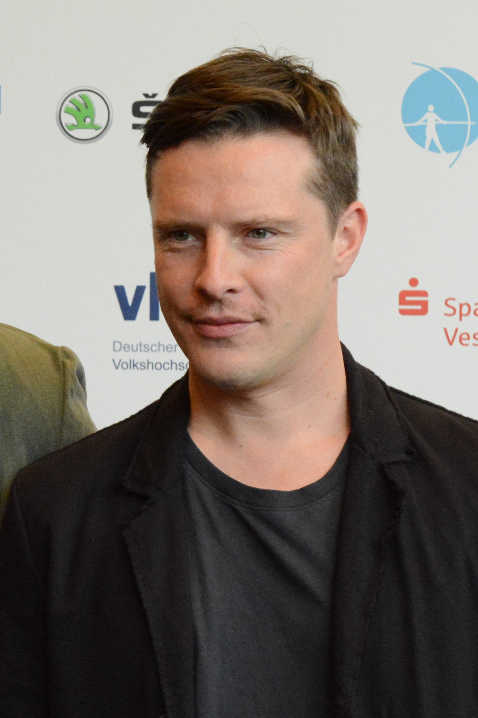 Florian Panzner bei der Verleihung des Grimme-Preises 2014.